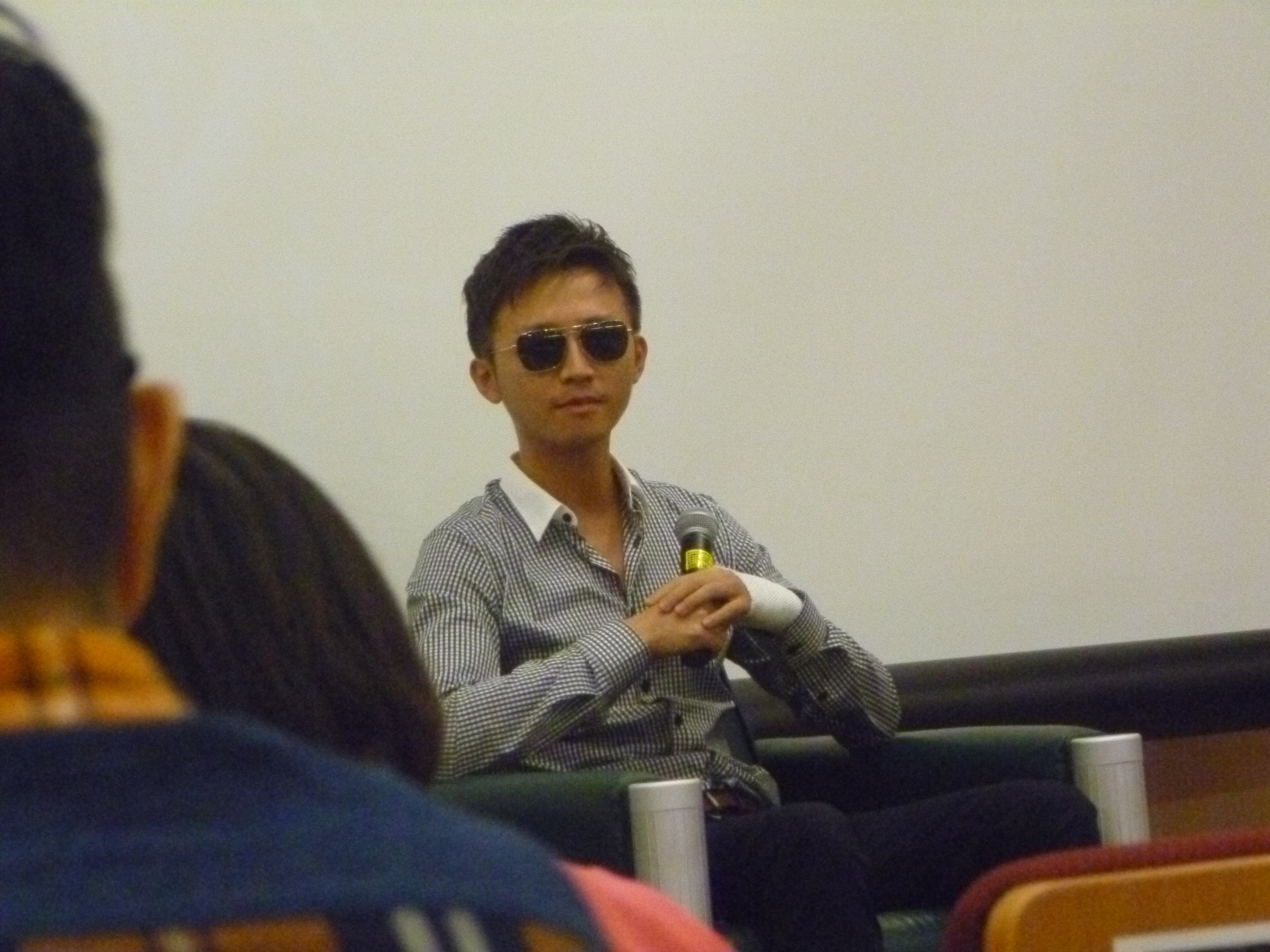 中文（台灣）: 金勤在《BBS鄉民的正義前傳：必要之闇》的台中首映會